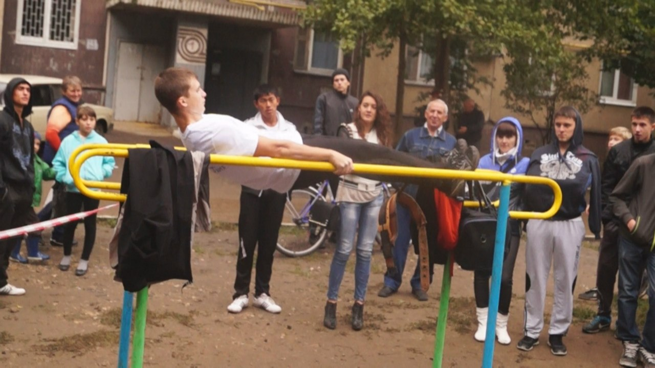 брусики